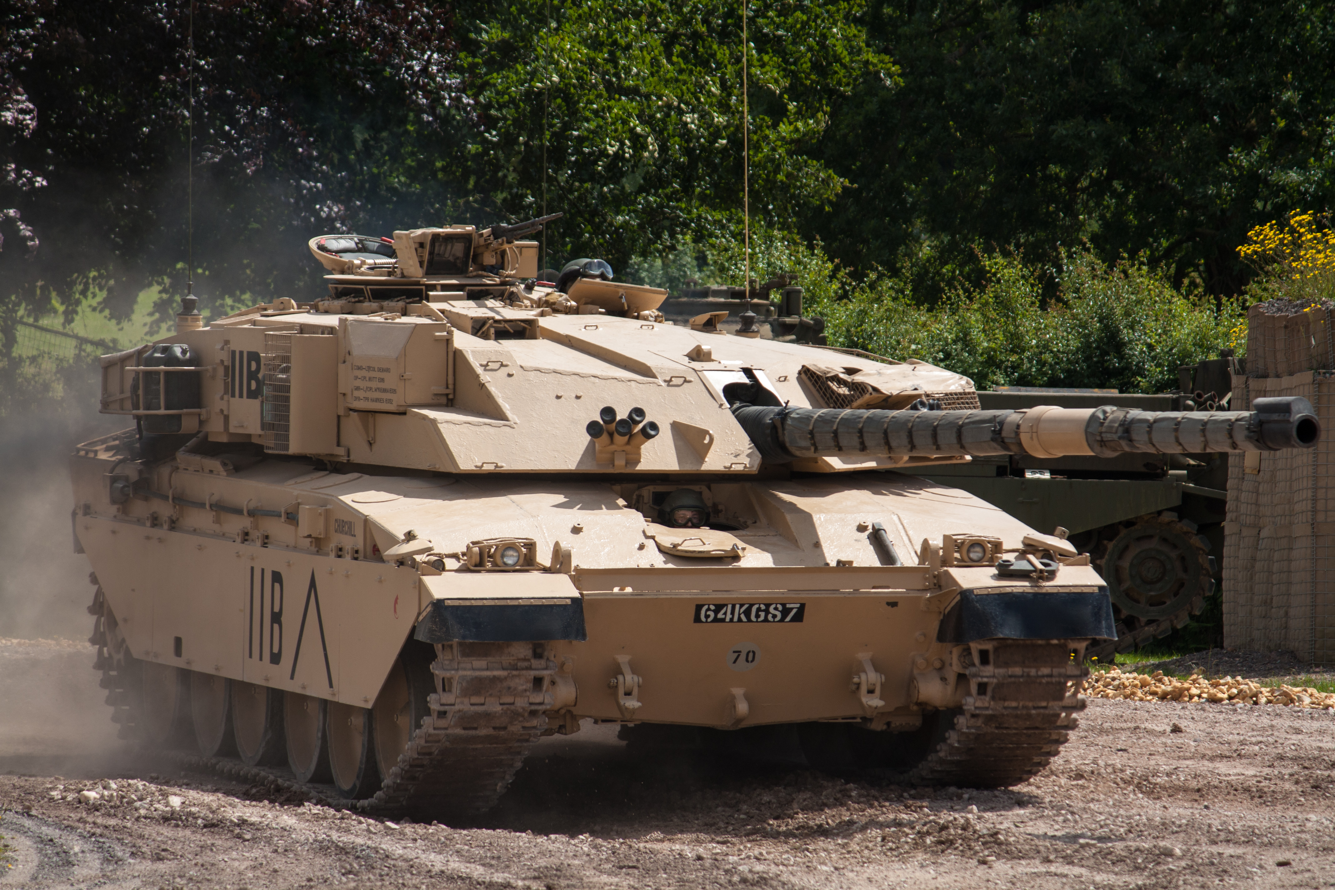 Challenger 1MBT Mk 3